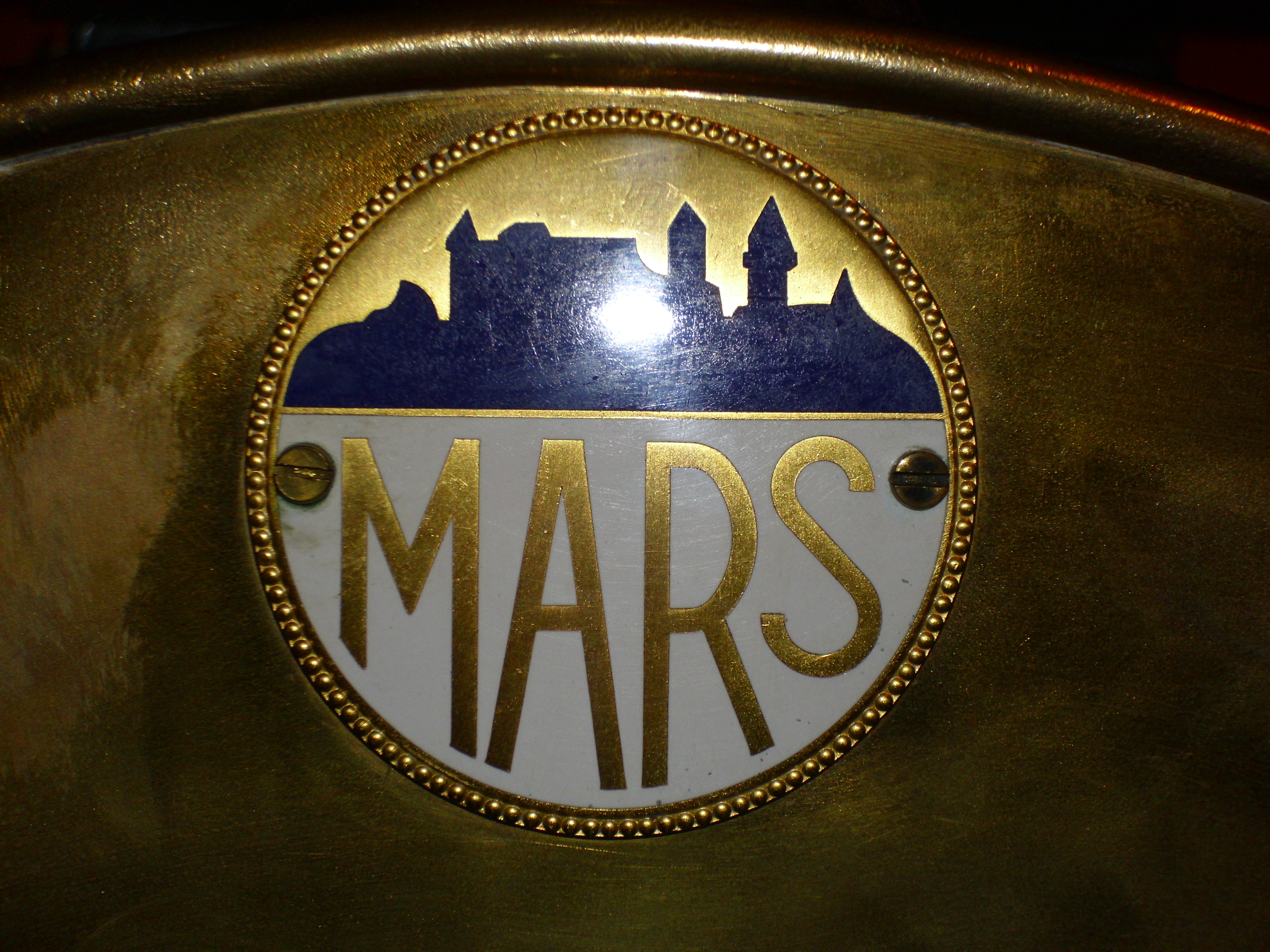 Emblem Mars